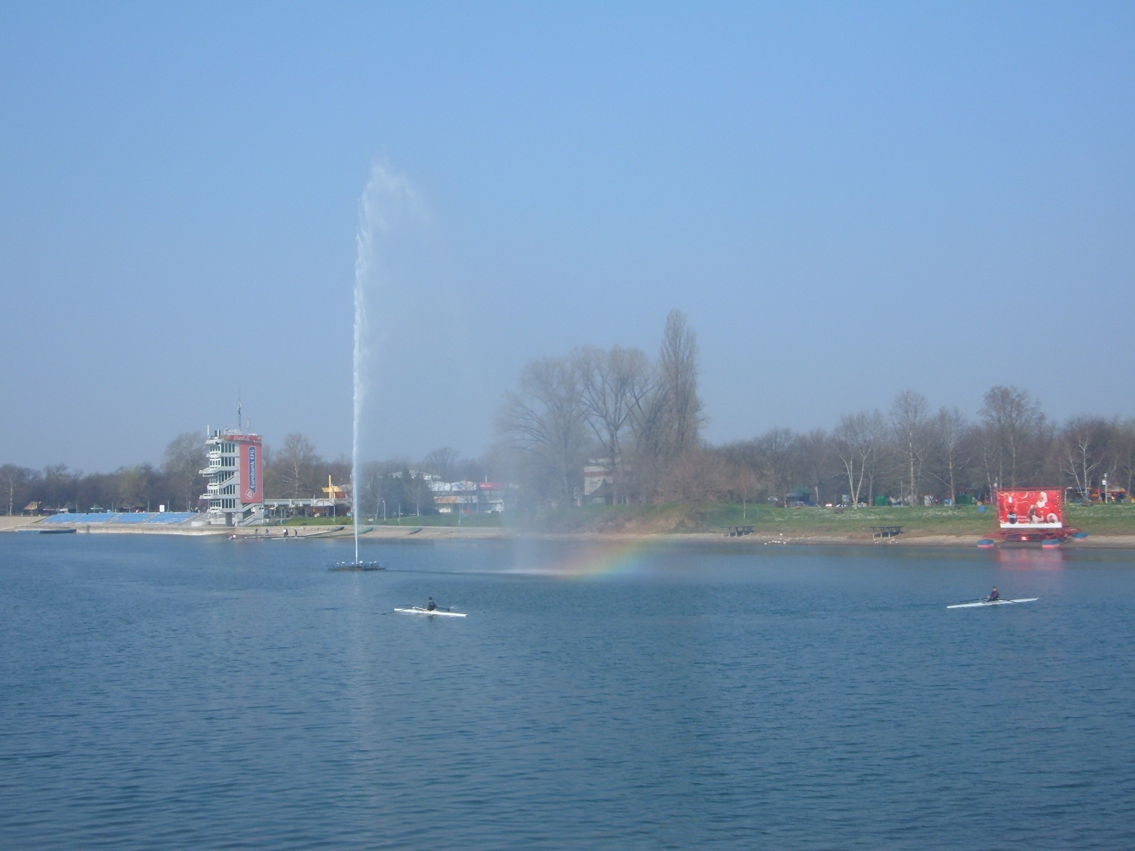 Dragan Lazarevic, ada ciganlija, beograd 2007